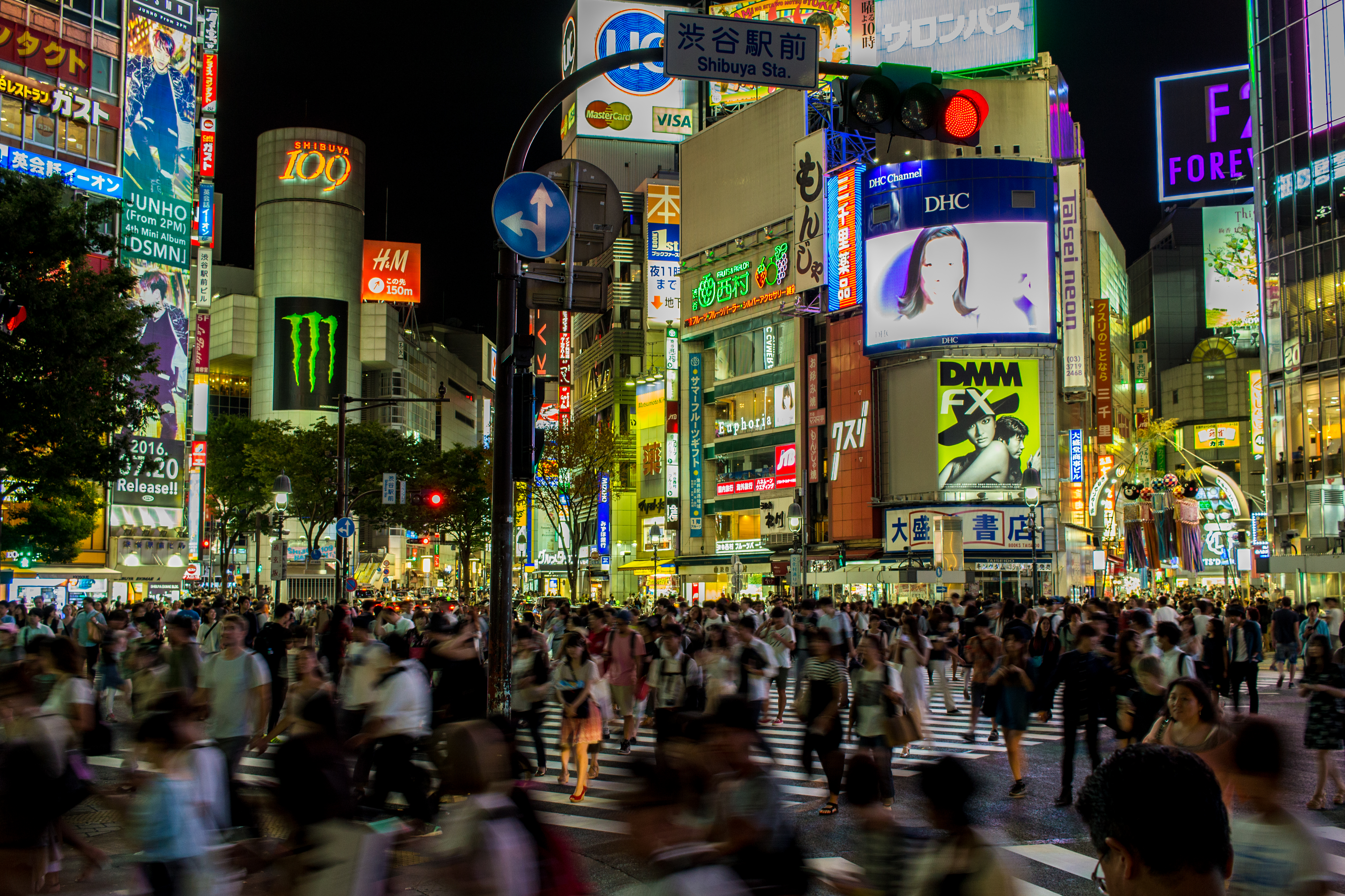 Shibuya Crossing by night